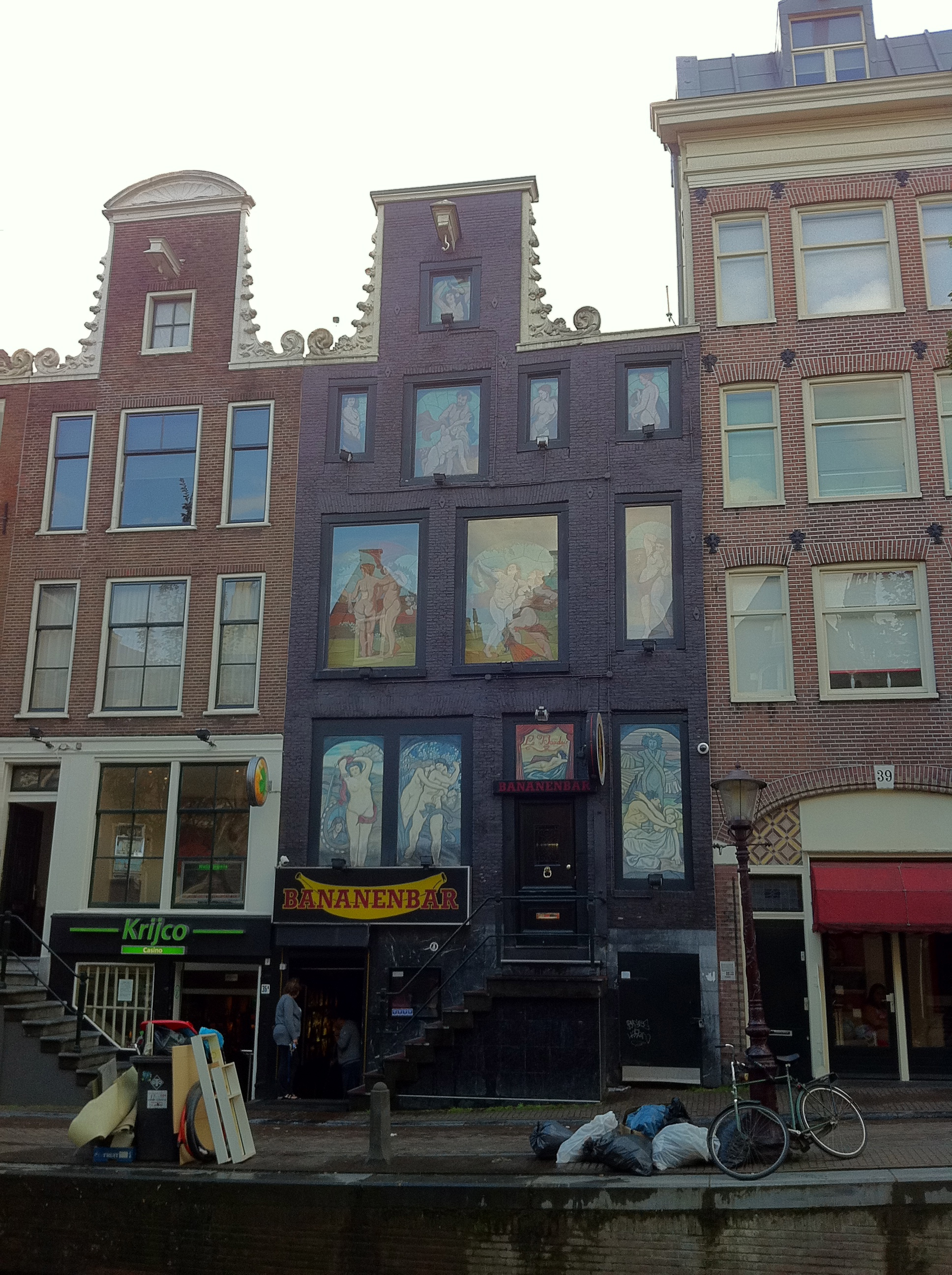 Foto gemaakt op de Amsterdamse oudezijds burgwallen Amsterdam - Oudezijds Achterburgwal 37